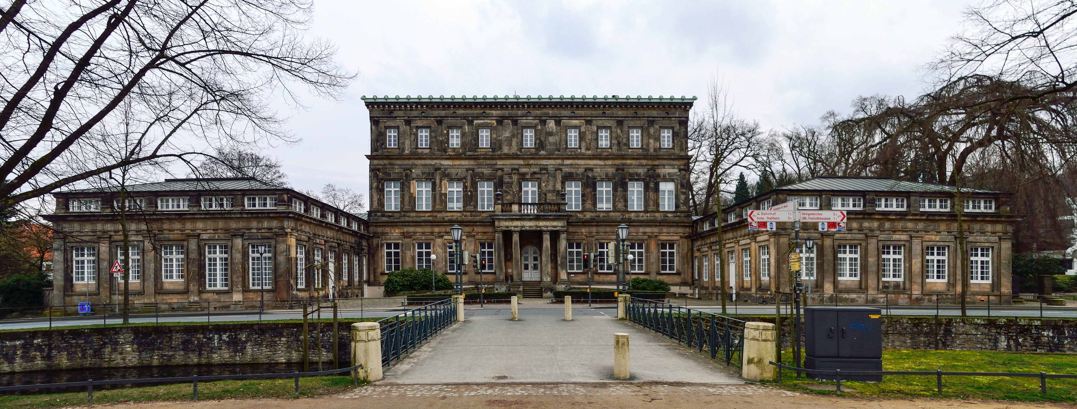 This is a photograph of an architectural monument. Neues Palais bzw. heutige Hochschule für Musik in Detmold